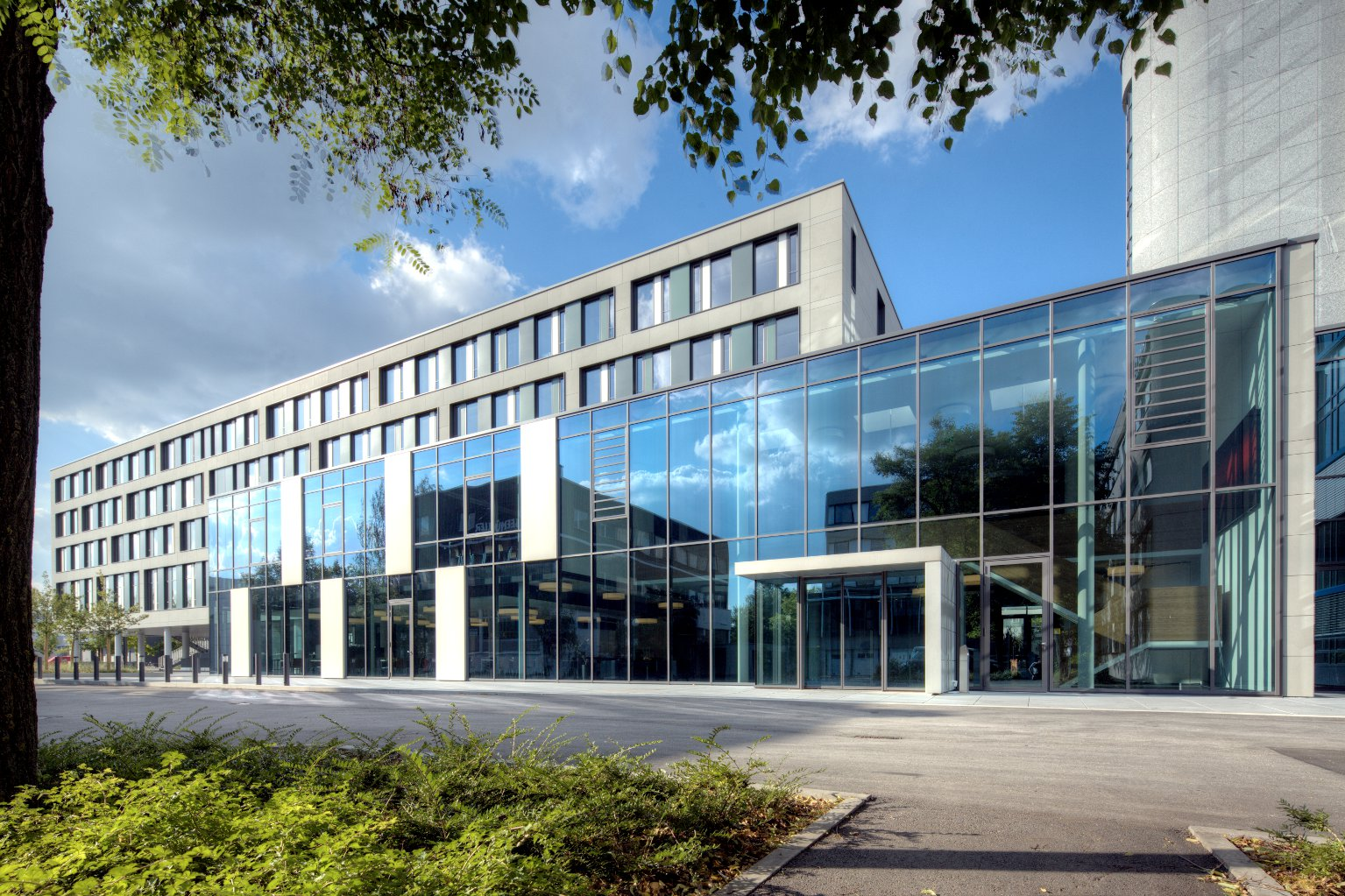 Firmensitz Müller-BBM GmbH in Planegg, Landkreis München